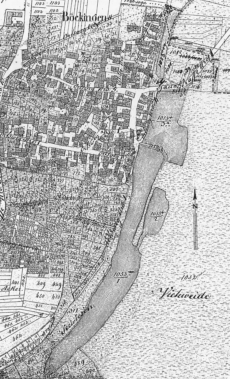 Böckingen am See, Plan von 1834